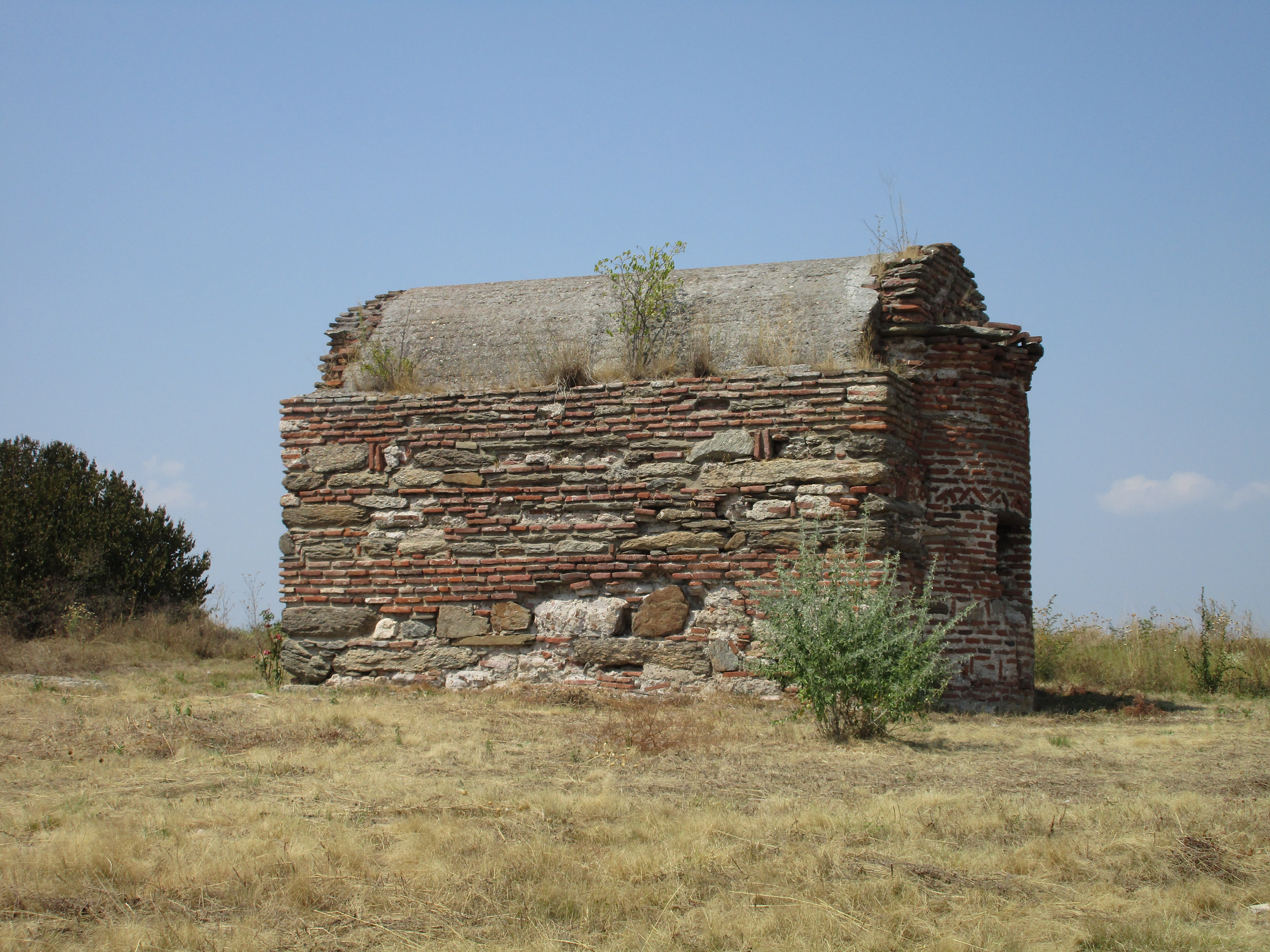 Srpski (latinica): Glašince